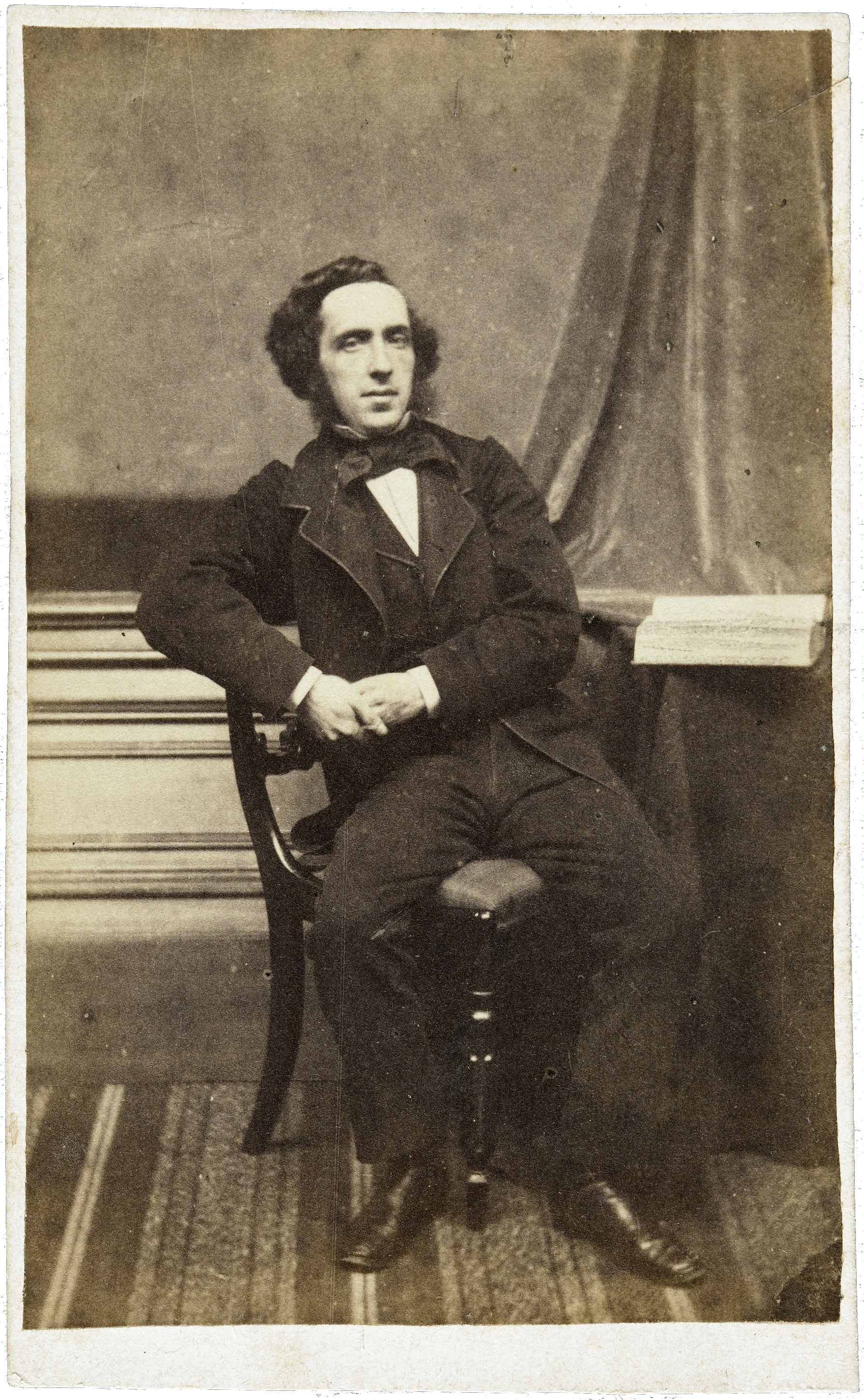 Petrus Augustus de Genestet